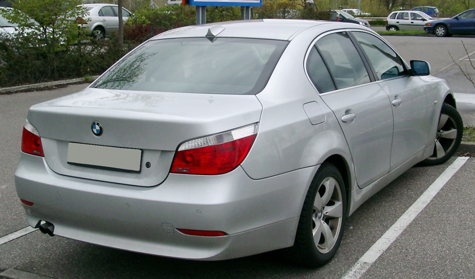 BMW E60